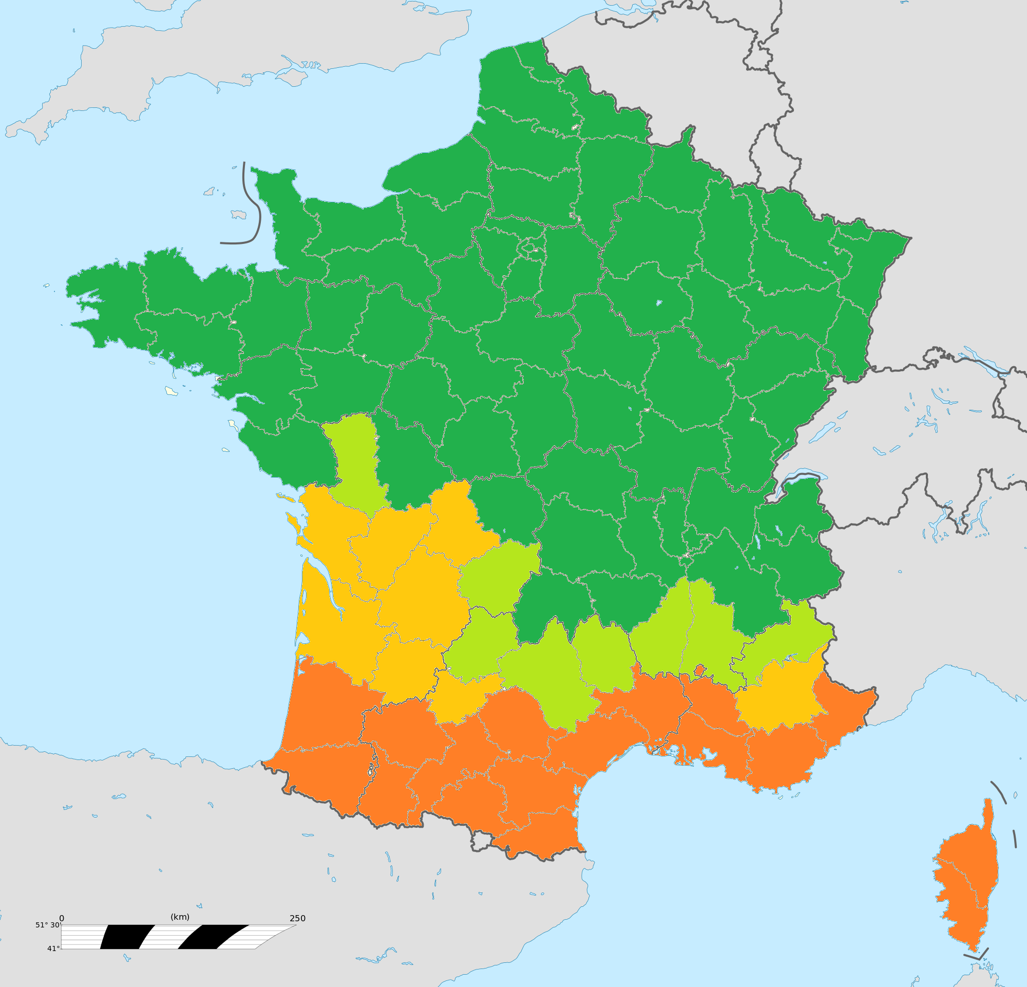 Carte de la répartition géographique de la galette et des gâteaux des rois en France selon les départements : Vert foncé : Galette des rois à 100 %. Vert clair : Galette des rois entre 50 et 75 %. Orange foncé : Gâteau des rois à 100 %. (≈) Orange clair : Gâteau des rois entre 50 et 75 %. Source : Jean-Laurent Cassely, « La carte de France des mangeurs de galette à la frangipane et des amateurs de gâteau des rois », Slate.fr, 16 janvier 2014. Lire en ligne